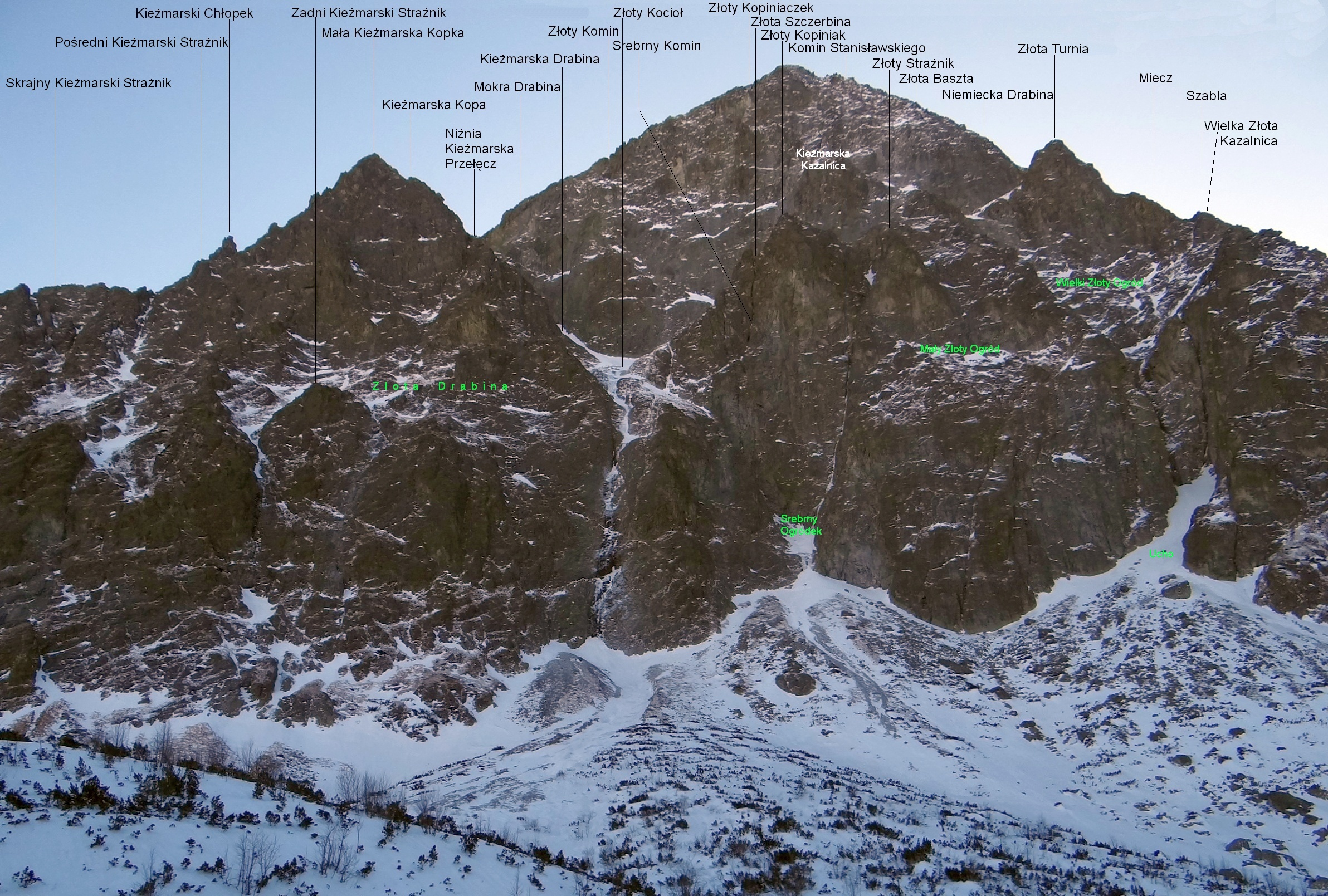 Mały Kieżmarski Szczyt i Kieżmarska Kopa